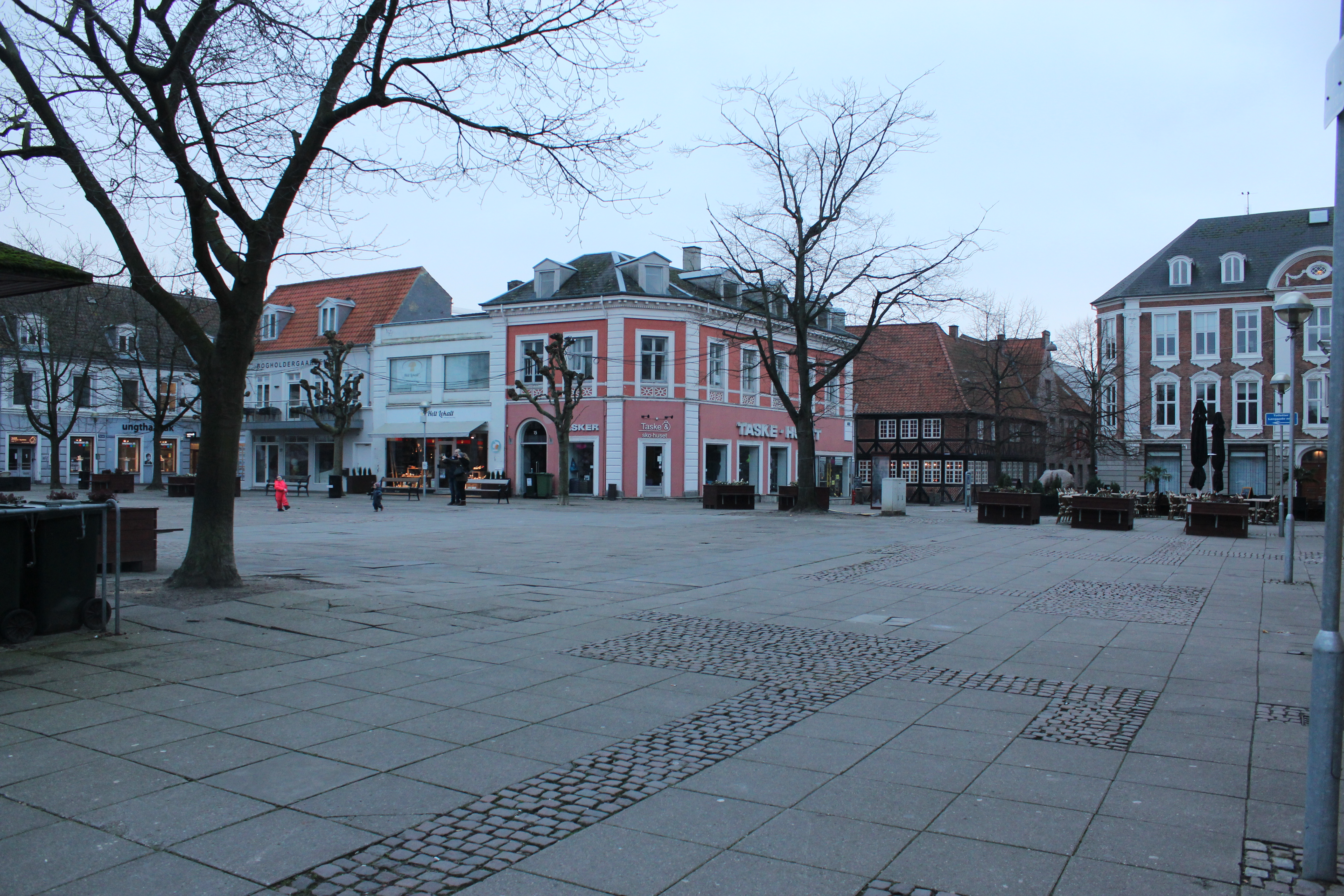 Torvet i Nykøbing. Czarens Hus kan ses i den fjerne ende af billedet.